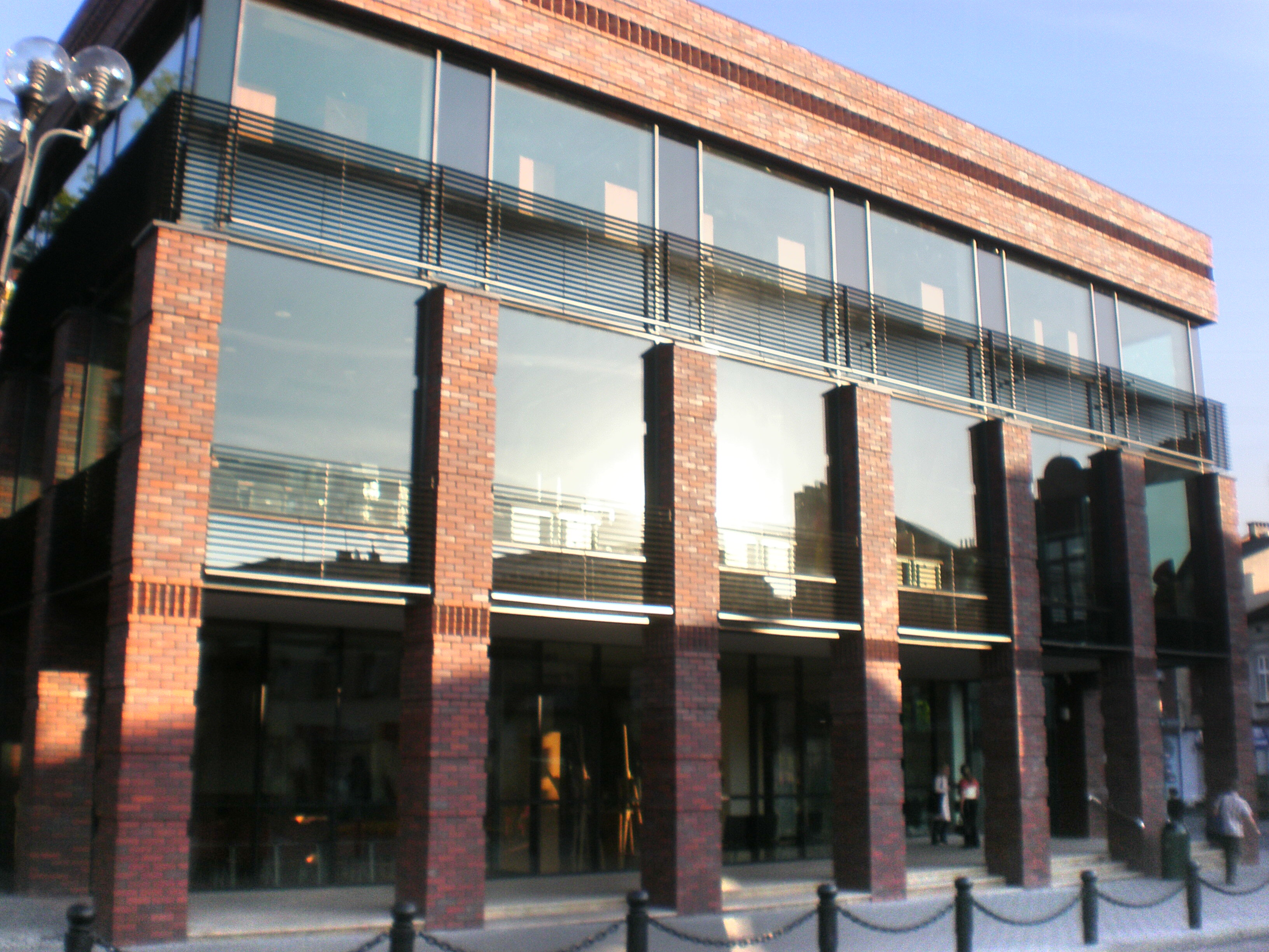 Bibioteka Miejska w Jaworznie.